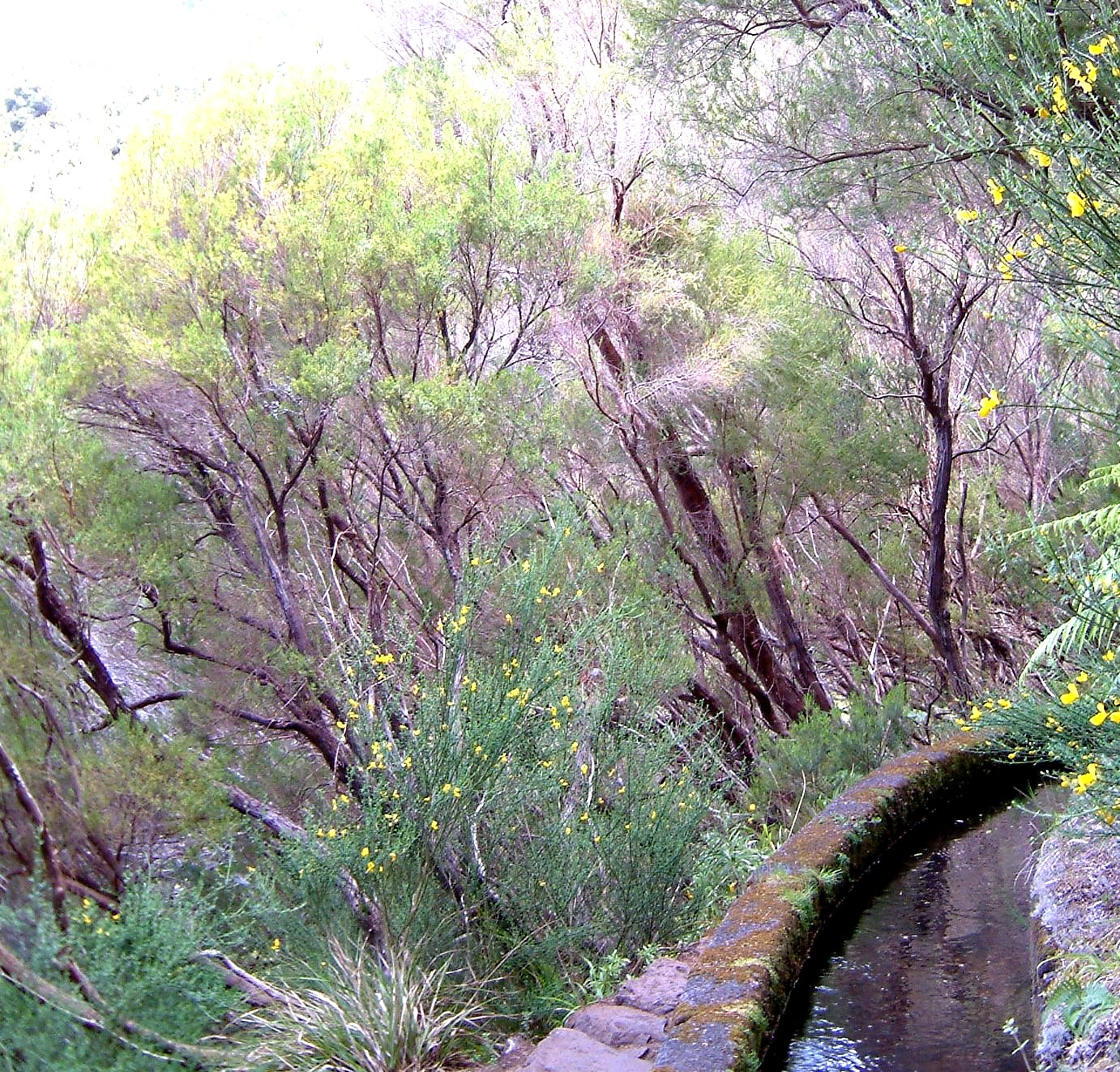 Madeira_-_an_der_Levada_do_Rabacal_5-07. Photograph: Peggy